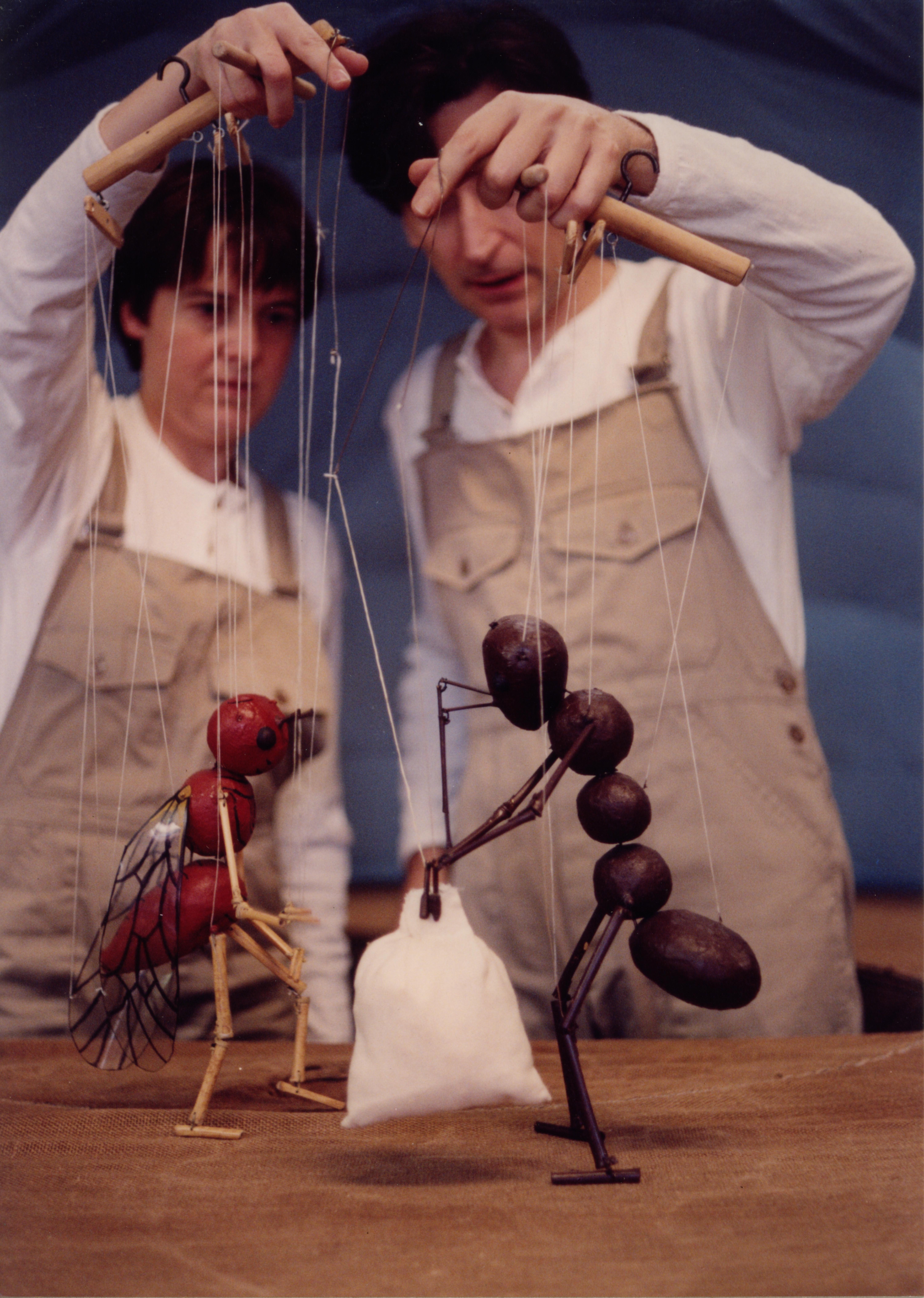 La Cigala i la Formiga. Marionetes de la Cia. Rocamora Teatre. Espectacle Faules de La Fontaine.